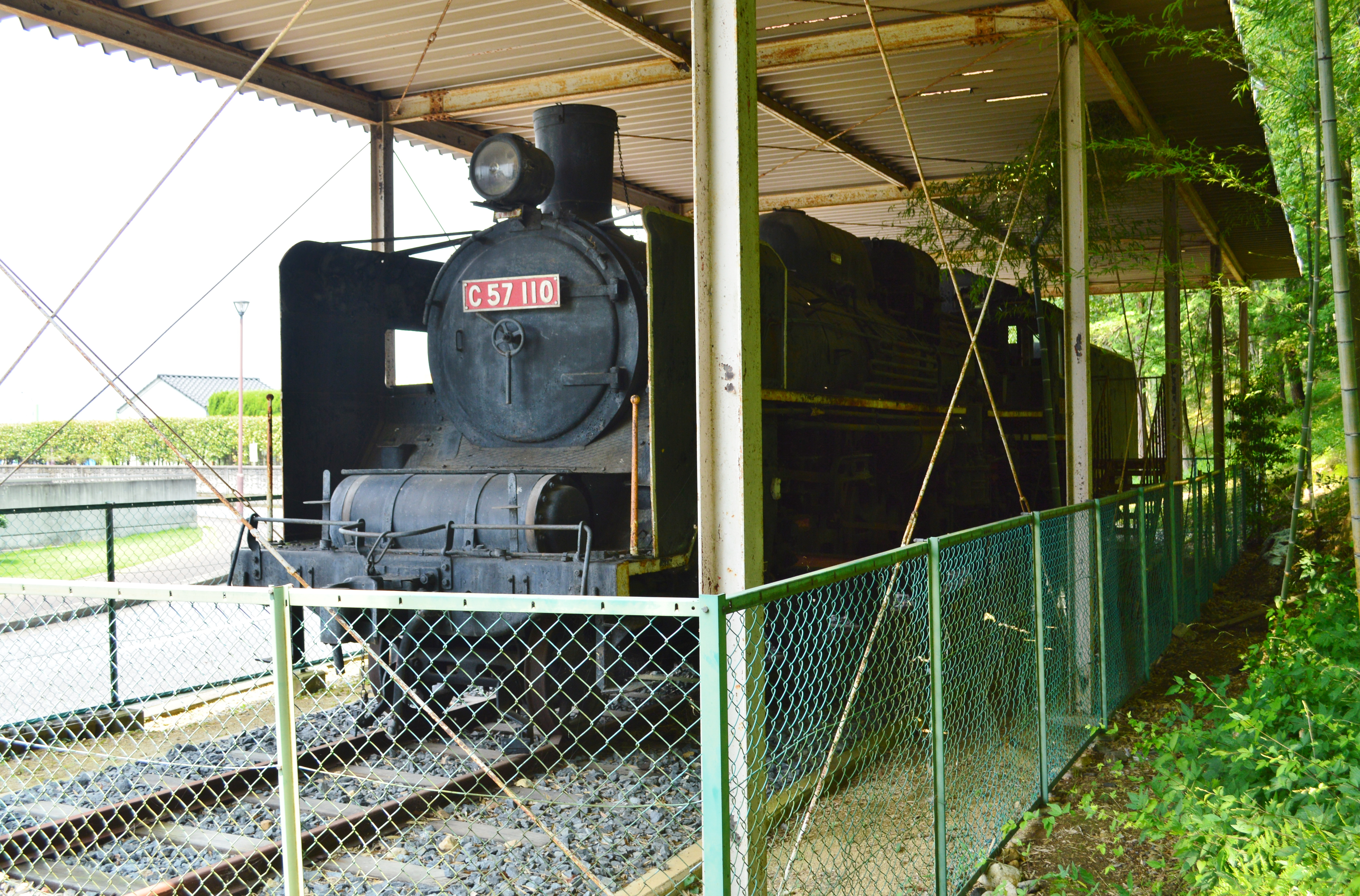 C57 110 (橋本体育館前にて)